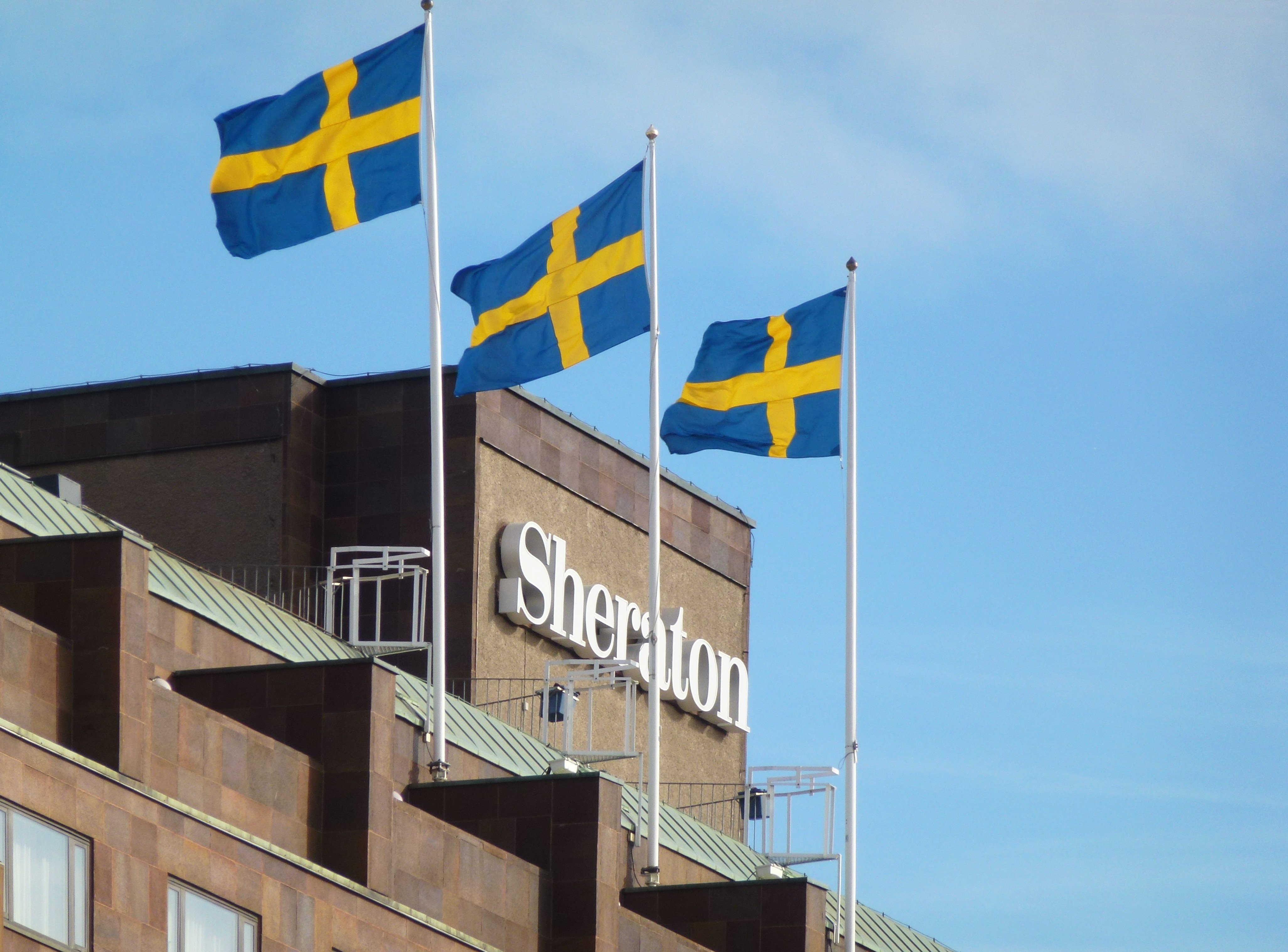 Hotel Sheraton, Stockholm